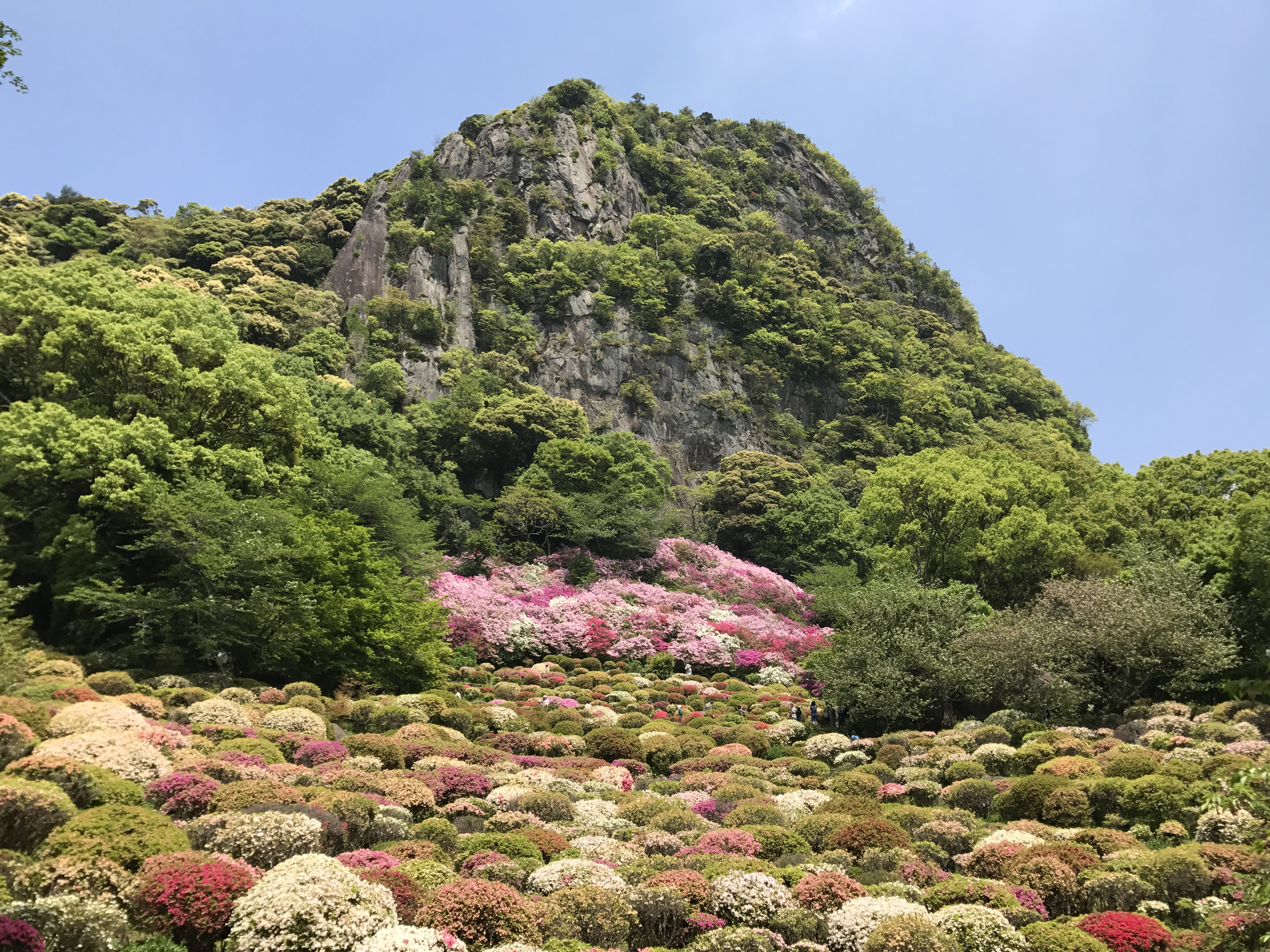 御船山楽園のツツジ谷と御船山